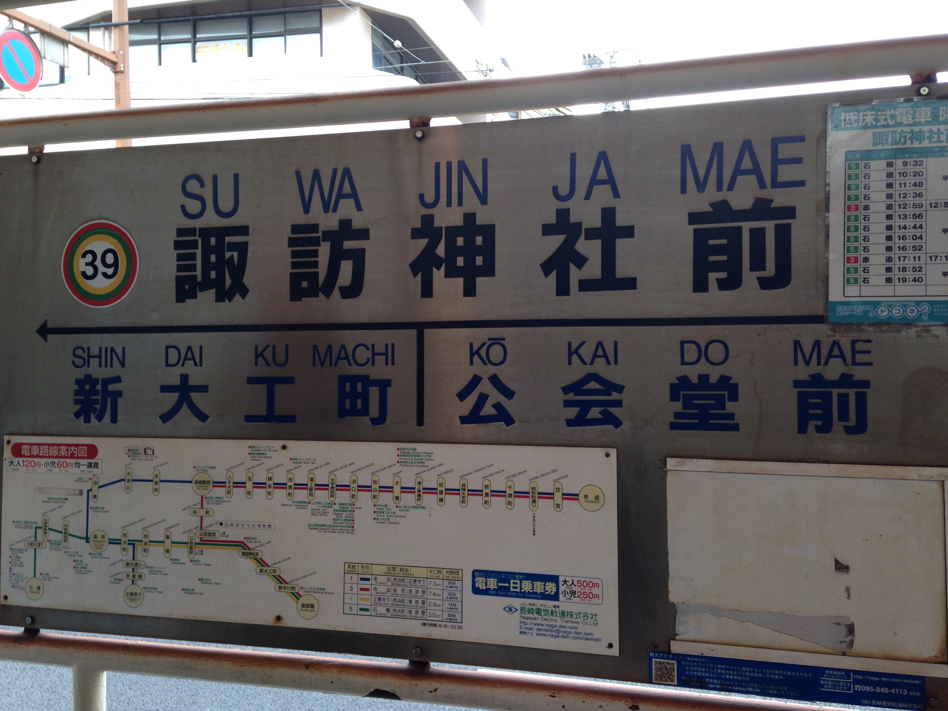 諏訪神社前電停の駅名標